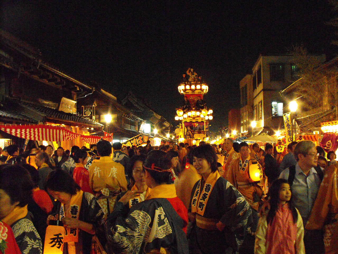 Kawagoe Festival at night